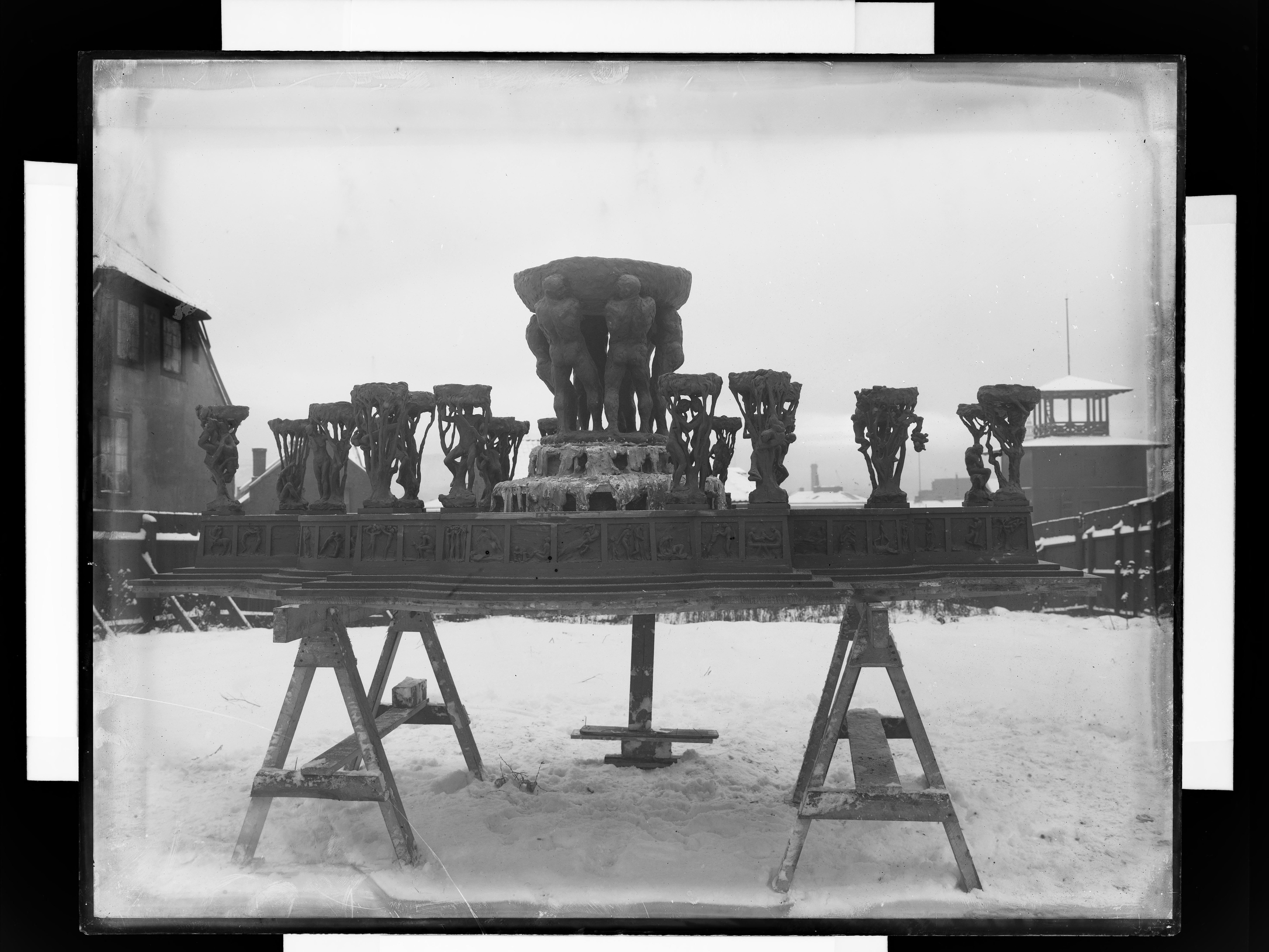 Bildet er hentet fra Nasjonalbibliotekets bildesamling. Anmerkninger til bildet var: Påskrift vedlagt ark: 766 Billedhugger Wigelands Fontæne. Utkast, skulpturer, billedhugging